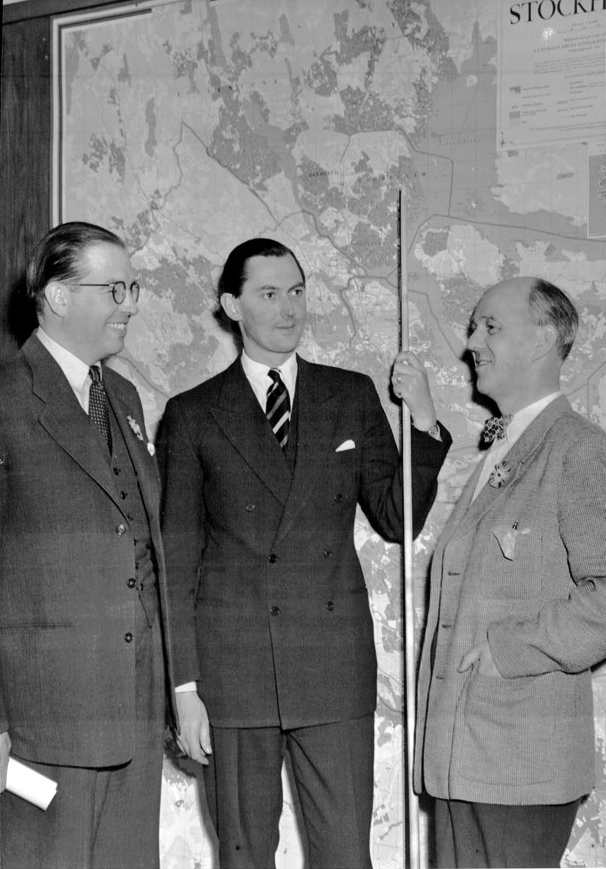 Kartredaktör Gösta Lundquist, docent Carl Mannerfelt och kartredaktör Gösta Lundberg vid den nya kartan.Storstockholm finns nu på en ny väggkarta utgiven av Generalstabens litografiska anstalt och till hösten kommer staden också att finnas på karta i en atlas. Väggkartan är i skala 1:16,000 och har just demonstrerats i Esseltehallen. Docent C. M:son Mannerfelt gav gav en orientering om det väldiga förarbetet med den nya, utomordentligt klara och rediga kartan. Den visar bebyggt område med namn på samtliga vägar och gator inom hela storstockholmsområdet från Rotebro i norr till Grödinge i söder, Norsborg i väster och Kummelnäs i öster. Dessutom redovisas planerade vägar och kvarter, offentliga byggnader, parkområden, skogsmark, busshållplatser, spårvägshållplatser utanför tullarna, droskstationer etc. samt administrativa gränser, kommunikationer m.m.